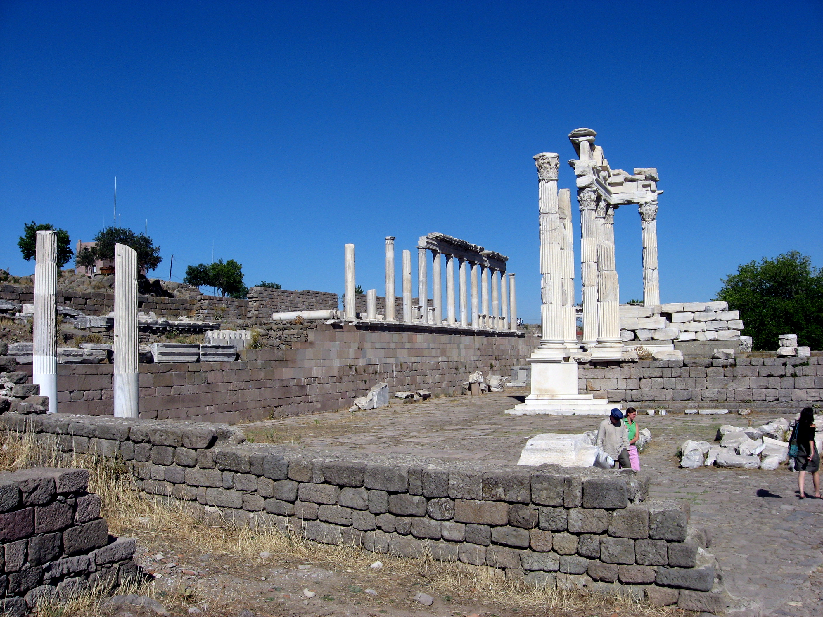 Pergamon